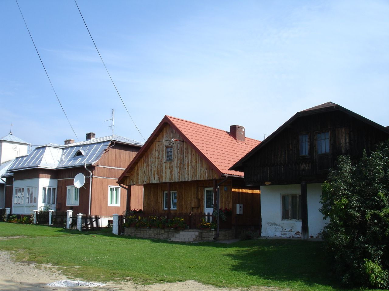 Jaćmierz - old buildings on the main square